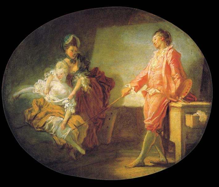 Les débuts du modèle